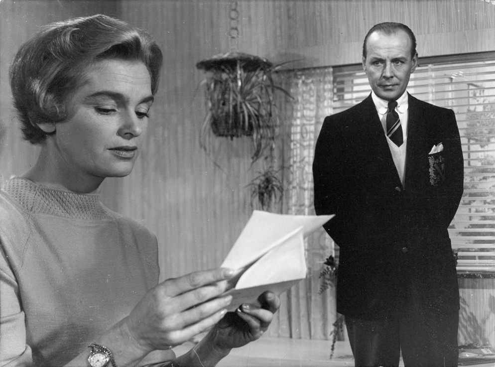 Film. "Kärlekens decimaler".